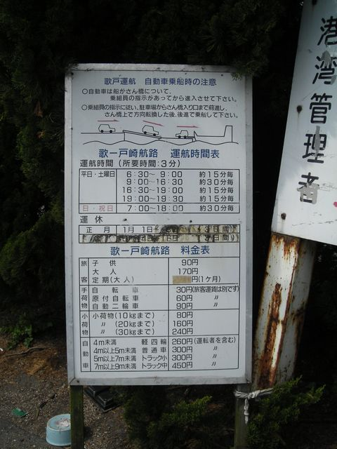 画像